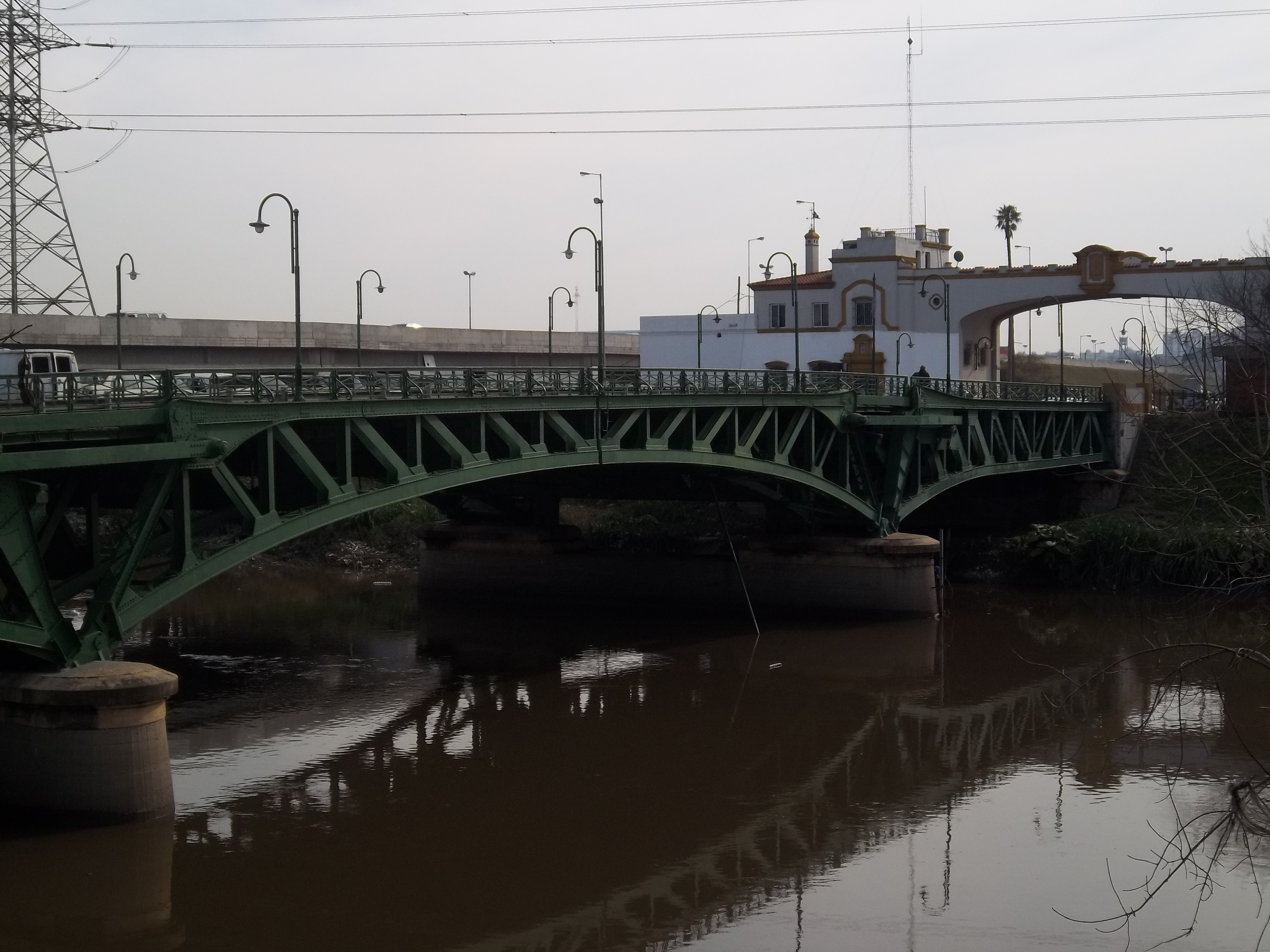 Puente de la Noria sobre el Riachuelo visto desde el Este en Villa Fiorito, partido de Lomas de Zamora, provincia de Buenos Aires, Argentina. Se aprecia el pórtico de la cabecera norte. Al fondo, puente construido en 2008.